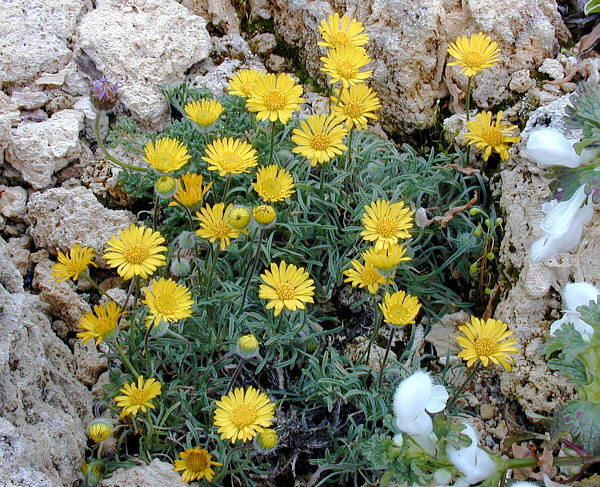 Petite plante vivace de 10 à 15 cm, sur terrain sec, souvent associée à des Artemisias. De la Californie au Névada et de l'état de Washington. (photo en culture)